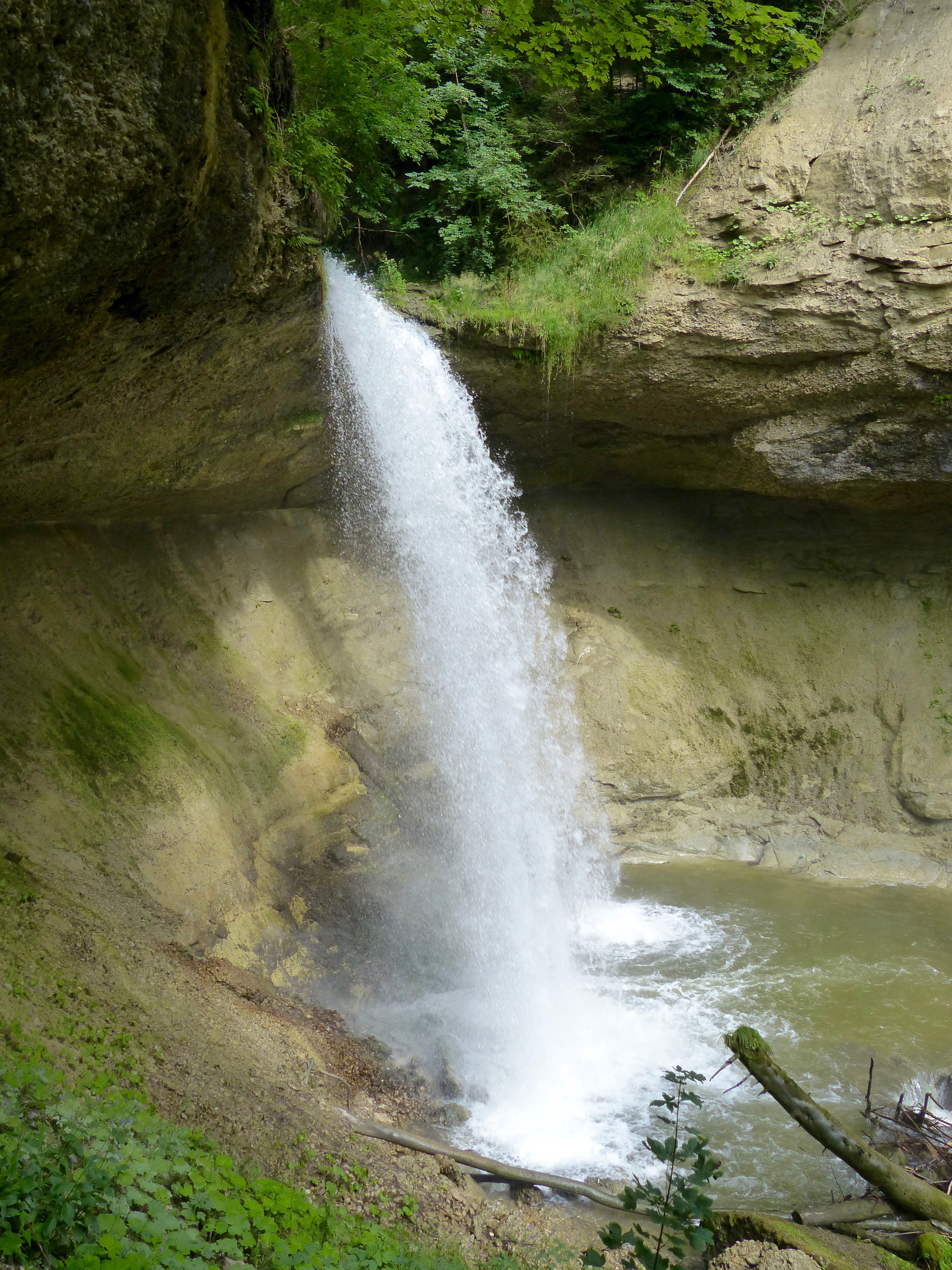 WikiProjekt Landstreicher Geotop Scheidegger Wasserfälle